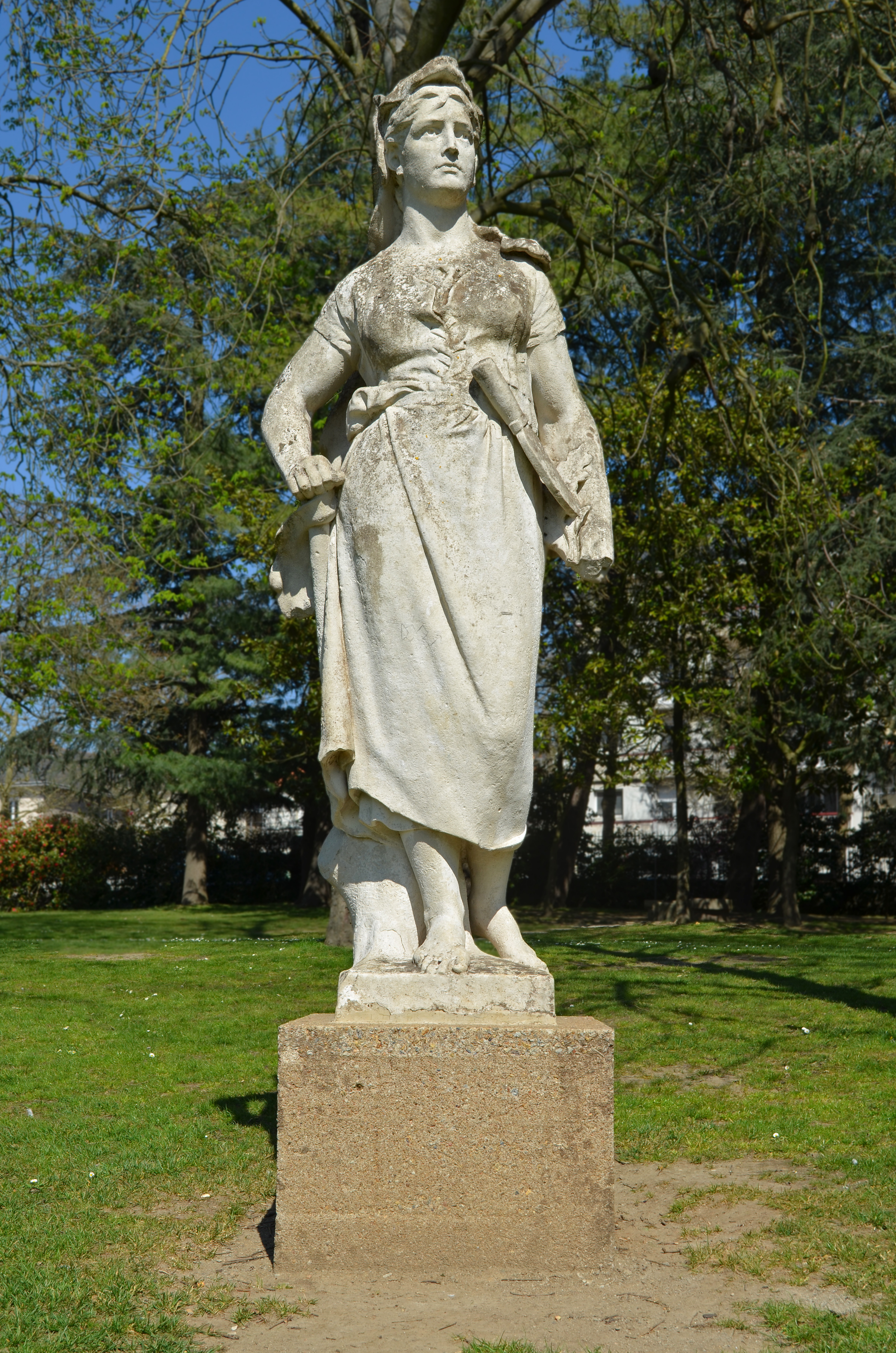 Sculpture allégorique intitulée Le Bûcheron ou La Forêt par Edmond Chrètien du Parc de Procé - Nantes